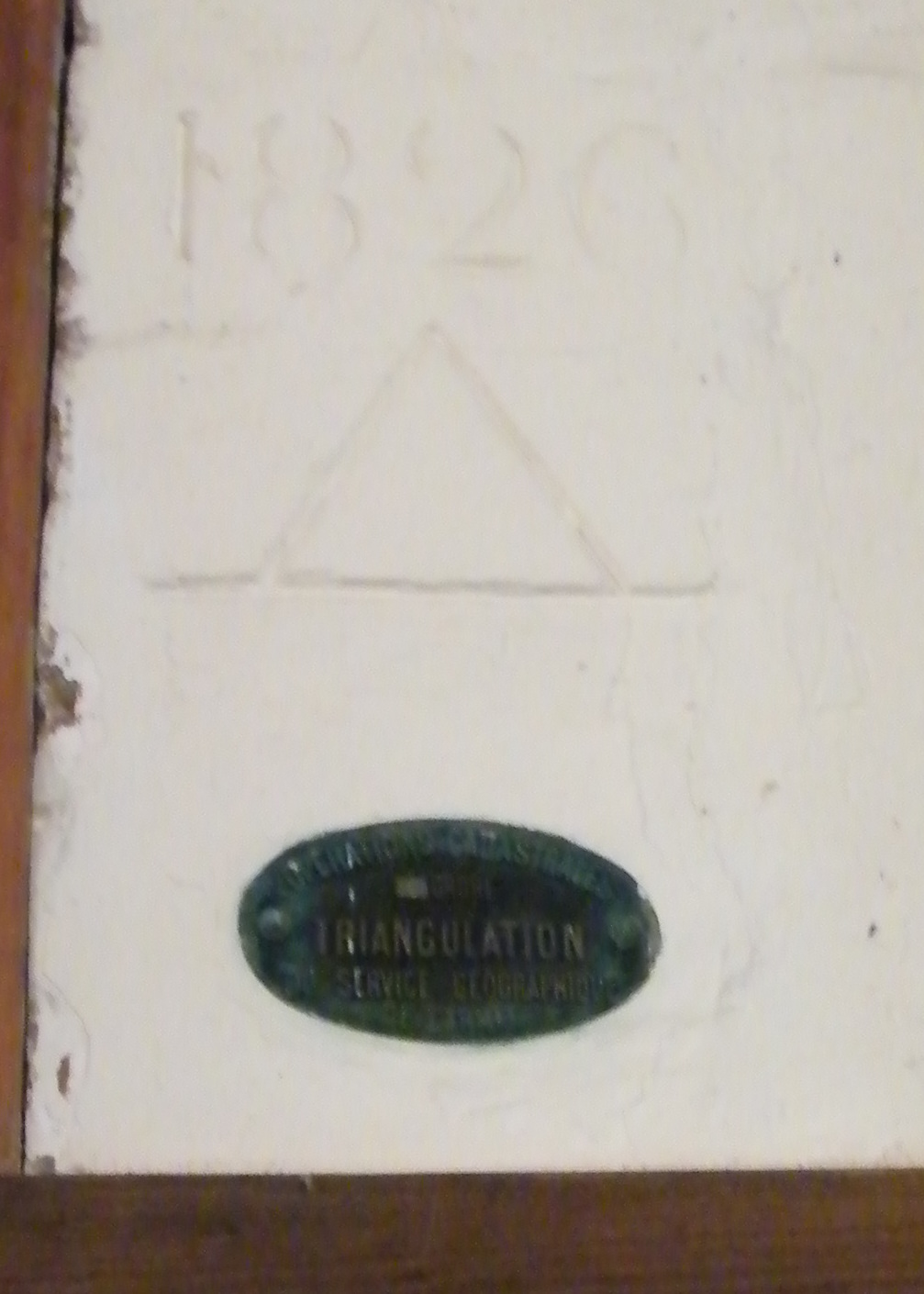 Quend, Somme, Fr, église Saint-Vaast, point de triangulation.